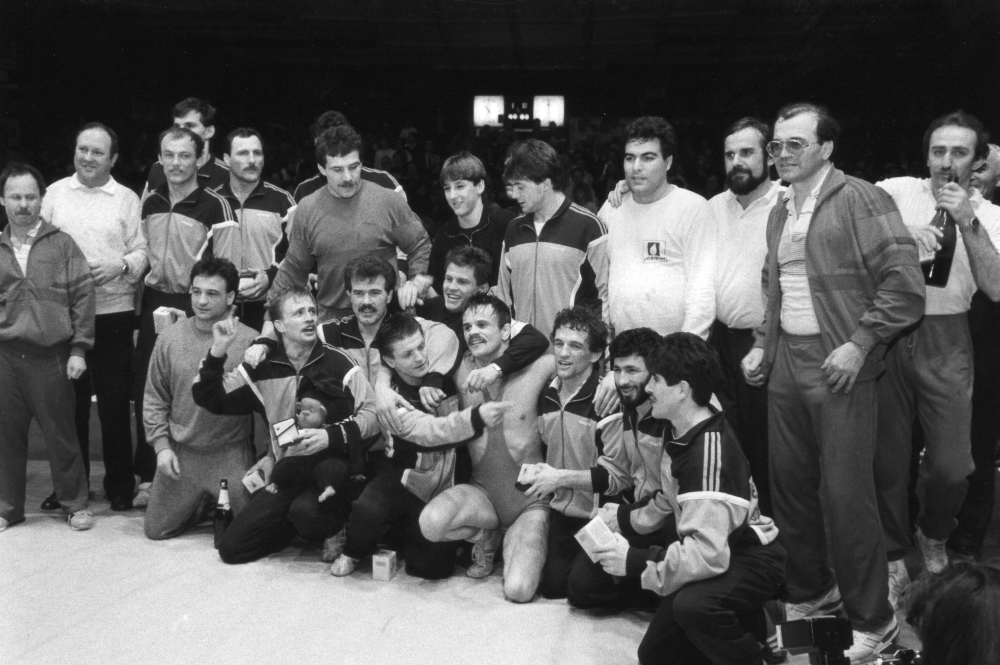 Gerhard Sattel (vordere Reihe, vierter von rechts) - Deutscher Meister (15.01.1988)